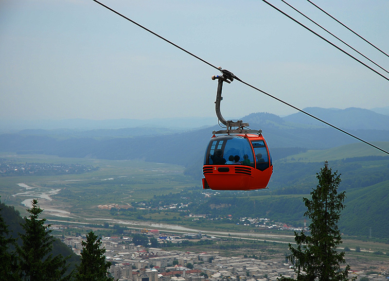 Telegondolă în Piatra Neamţ